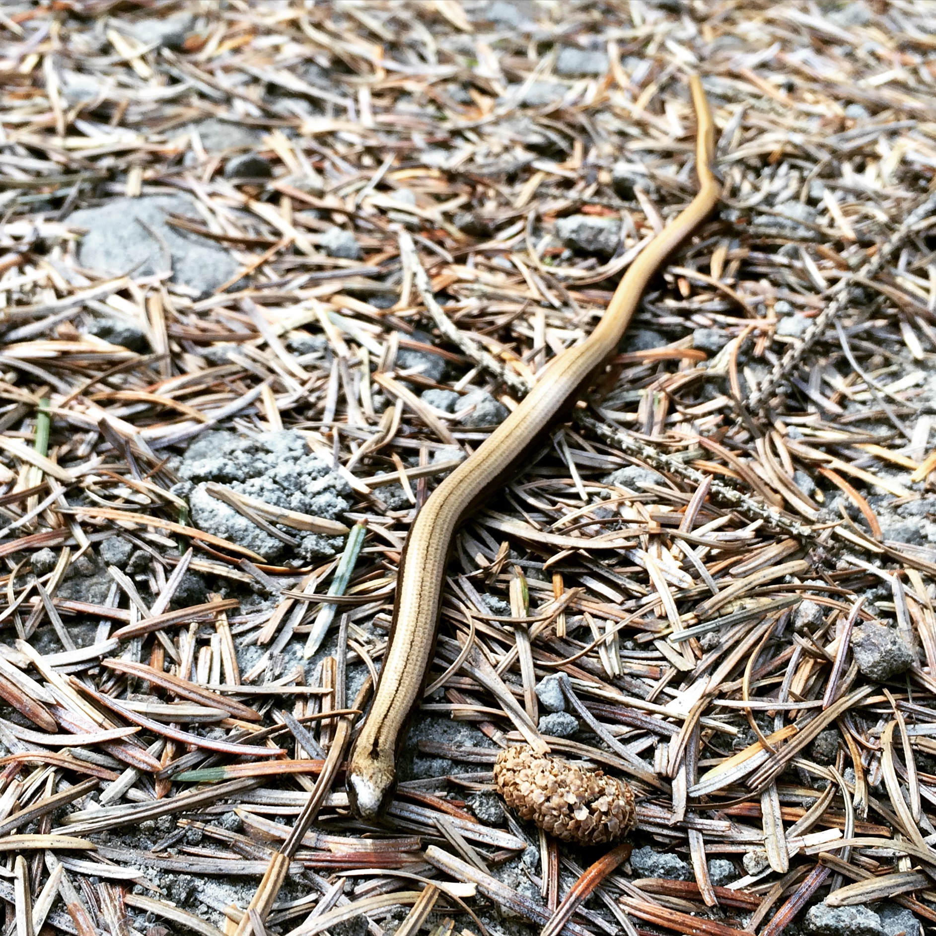 Neidr ddefaid yn croesi llwybr mewn coedwig fythwerdd ym Merthyr Tudful.